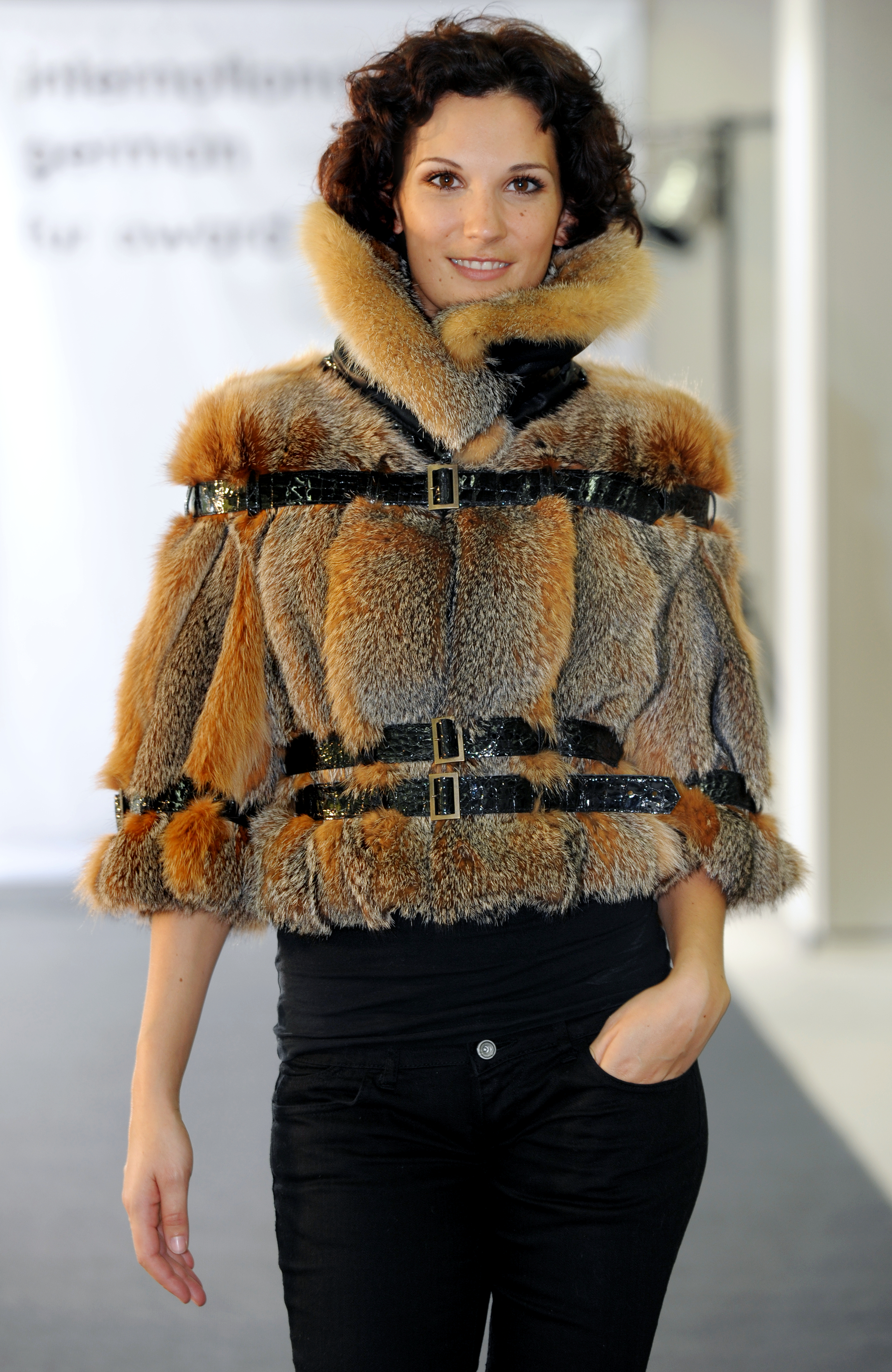 International German Fur Award 2009 des Kürschnerhandwerks. Grisfuchsjacke, Pelzmodelle Fahnenstich, Recklinghausen.